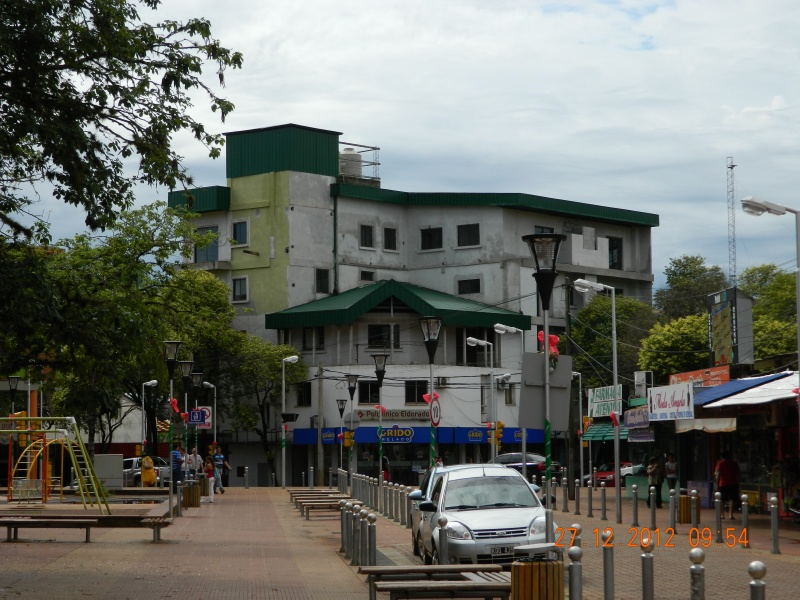 El Dorado, Misiones